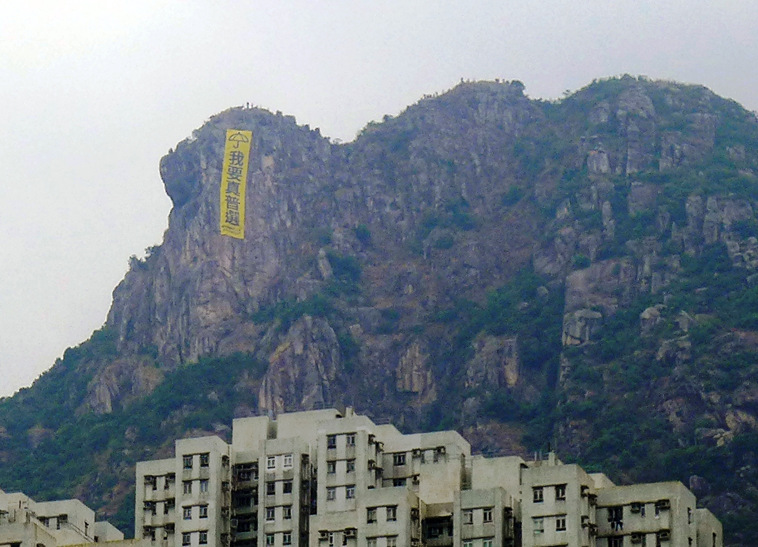 Lion Rocks Umbrella Revolution Banner